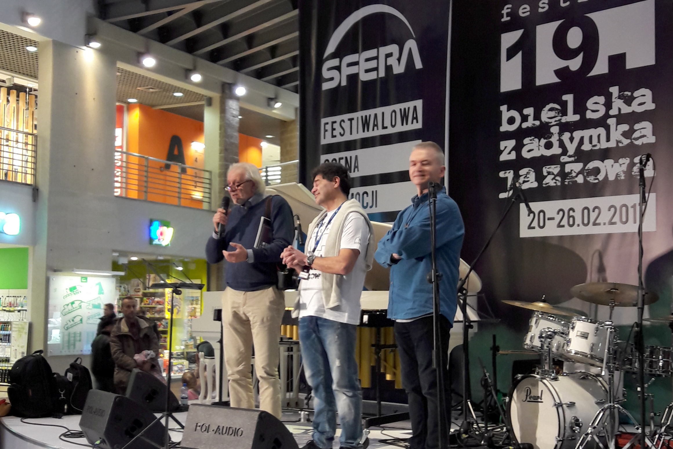 Henryk Malesa bei der Bielska Zadymka Jazzowa